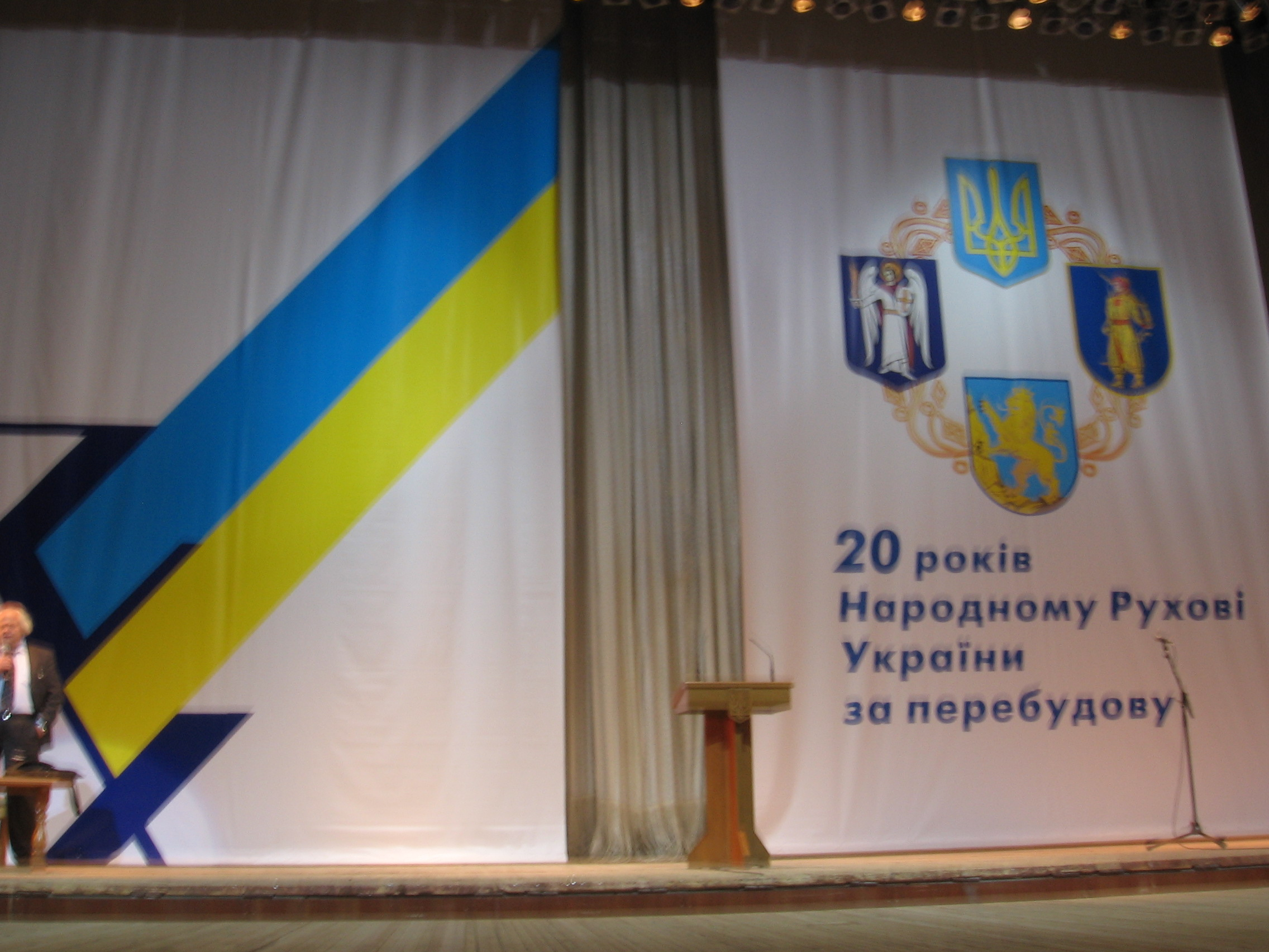 Відзначення 20 років НРУ: Фото